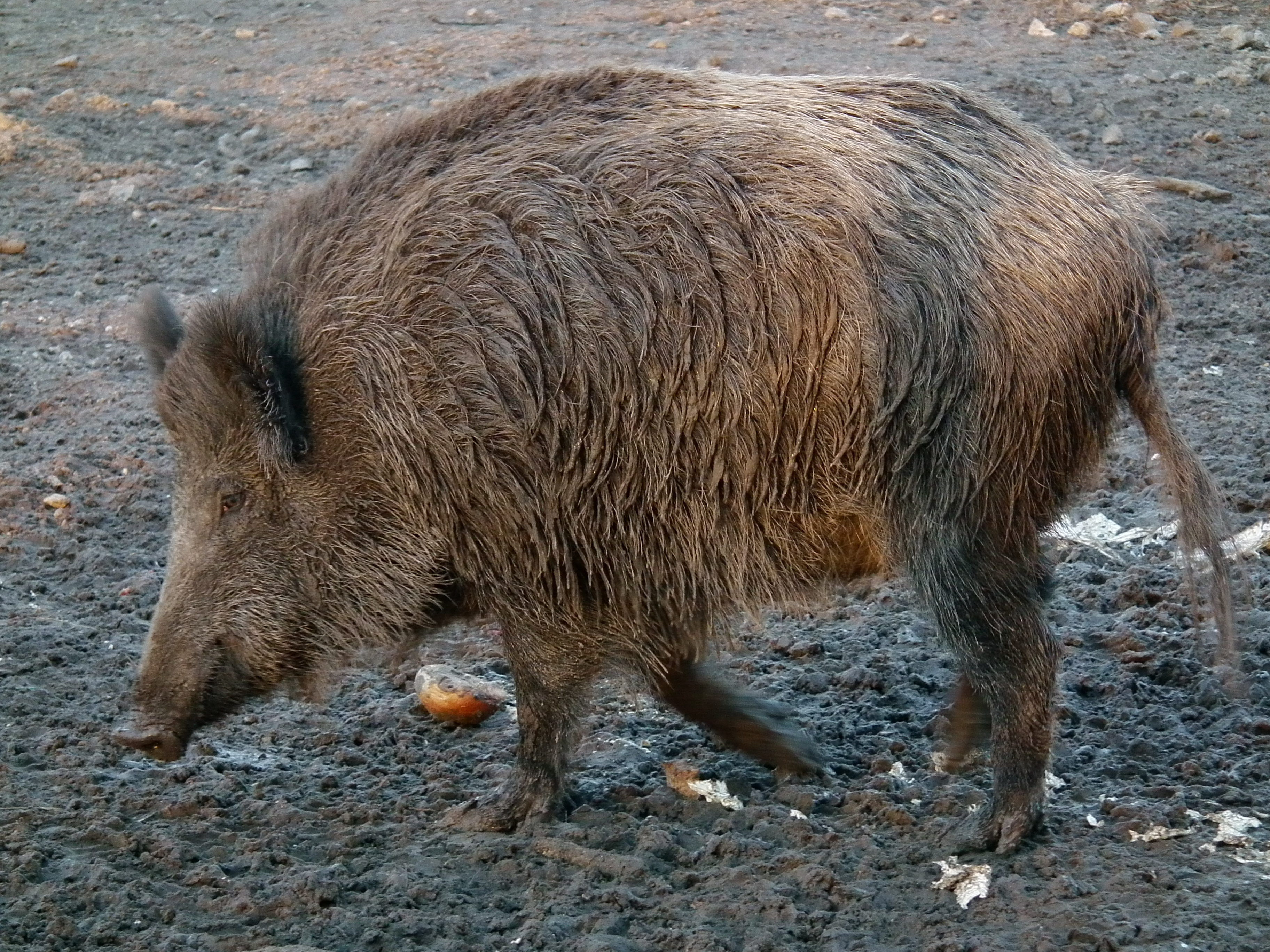 Ausgewachsenes Wildschwein (Sus scrofa), fotografiert im Wildgehege Rheinauer Wald (Mannheim, Baden-Württemberg, Deutschland)